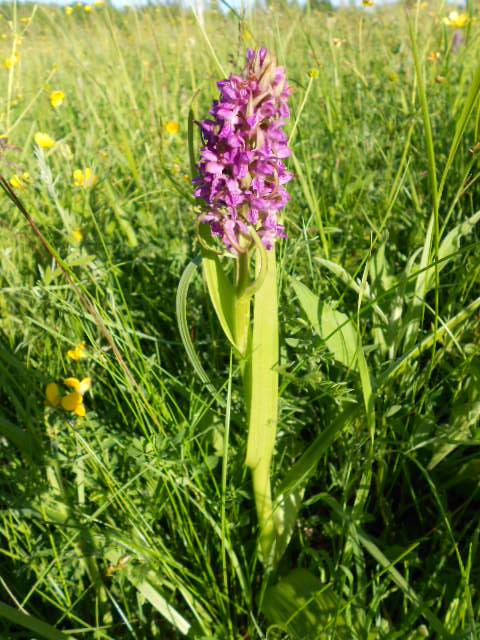 Kahkjaspunane sõrmkäpp